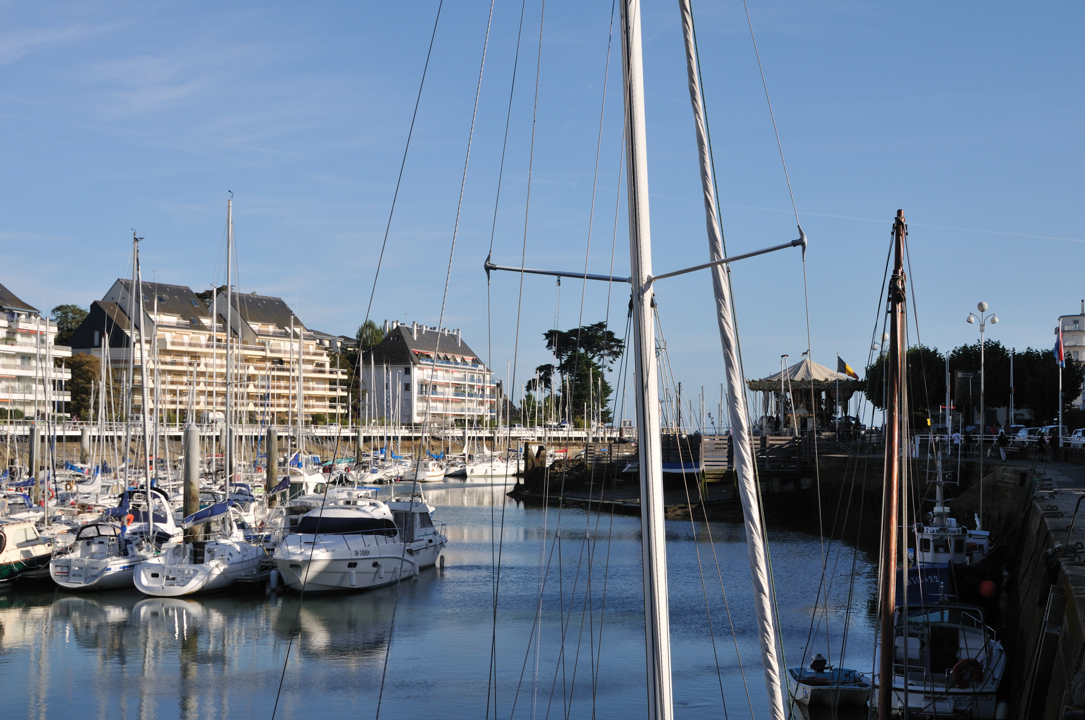 Port de La Baule - Le Pouliguen, Loire-Atlantique, France (La Baule à gauche, Le Pouliguen à droite)